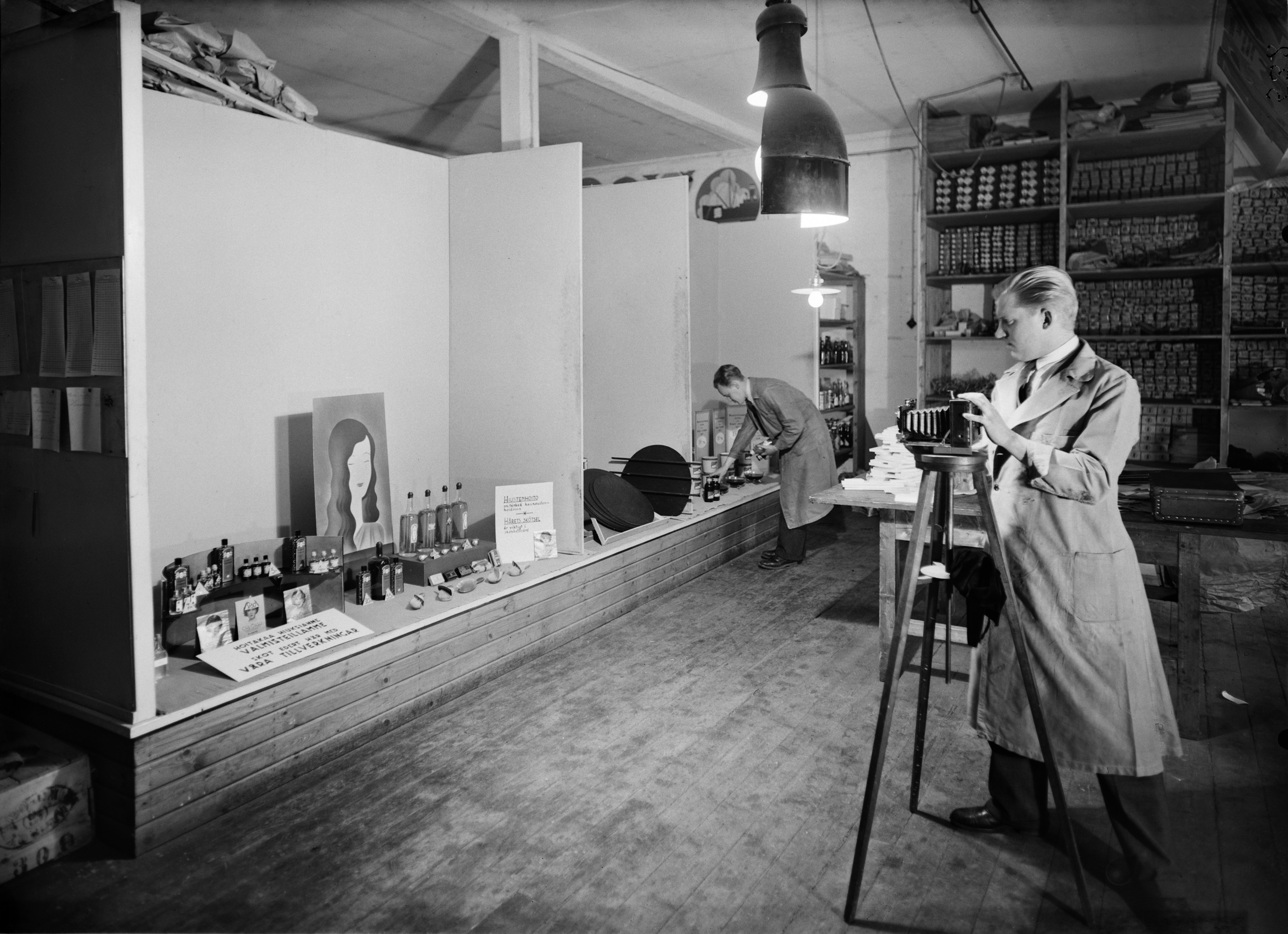 Eino heinonen valokuvaa malli-ikkunaa kuvataan Elannon koristeluosastolla l. somistamossa entisen tulitikkutehtaan rakennuksessa; Eino heinonen valokuvaa malli-ikkunaa kuvataan Elannon koristeluosastolla l. somistamossa entisen tulitikkutehtaan rakennuksessa. Hämeentie 13. -- negatiivi, lasi, mv